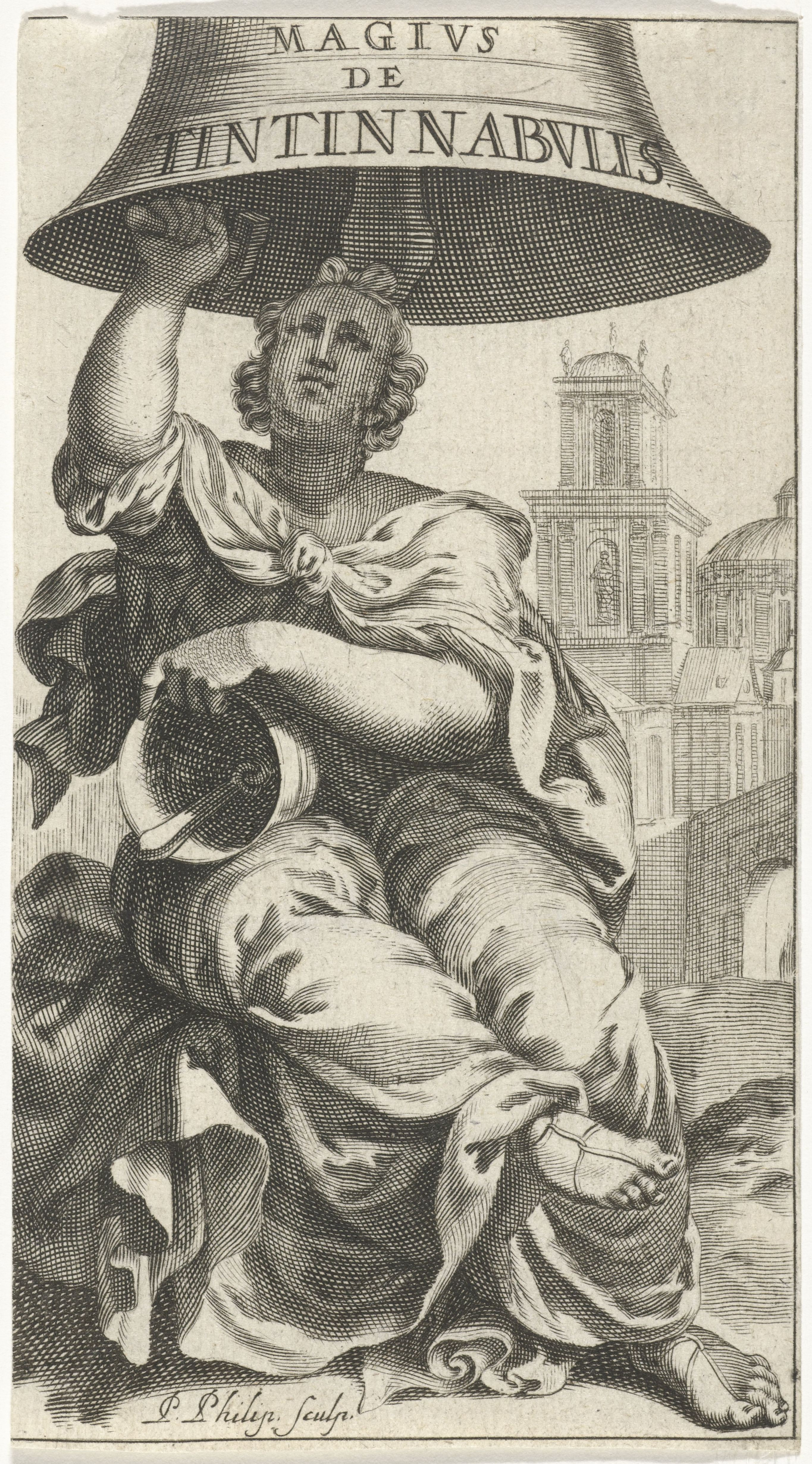 IdentificatieTitel(s): Titelpagina voor: G. Maggi, De tintinnabulis liber postumus, 1664Objecttype: prent titelpagina Objectnummer: RP-P-1907-4762Catalogusreferentie: Hollstein Dutch 24Opschriften / Merken: verzamelaarsmerk, verso, gestempeld: Lugt 2228Omschrijving: Landschap met een vrouw die onder een bel zit Waar: op de titel "De tintinnabulis liber postumus". Met een hamer slaat ze tegen de bel. Op haar schoot een kleinere bel.VervaardigingVervaardiger: prentmaker: Pieter Philippe (vermeld op object)Plaats vervaardiging: Noordelijke NederlandenDatering: 1664Fysieke kenmerken: gravureMateriaal: papier Techniek: graveren (drukprocedé)Afmetingen: blad: h 116 mm × b 64 mmToelichtingTitelpagina voor: Maggi, Girolamo, De tintinnabulis liber postumus. Amsterdam: Henricus Wetstein, 1664.OnderwerpWat: church bellVerwerving en rechtenVerwerving: aankoop 1907Copyright: Publiek domein